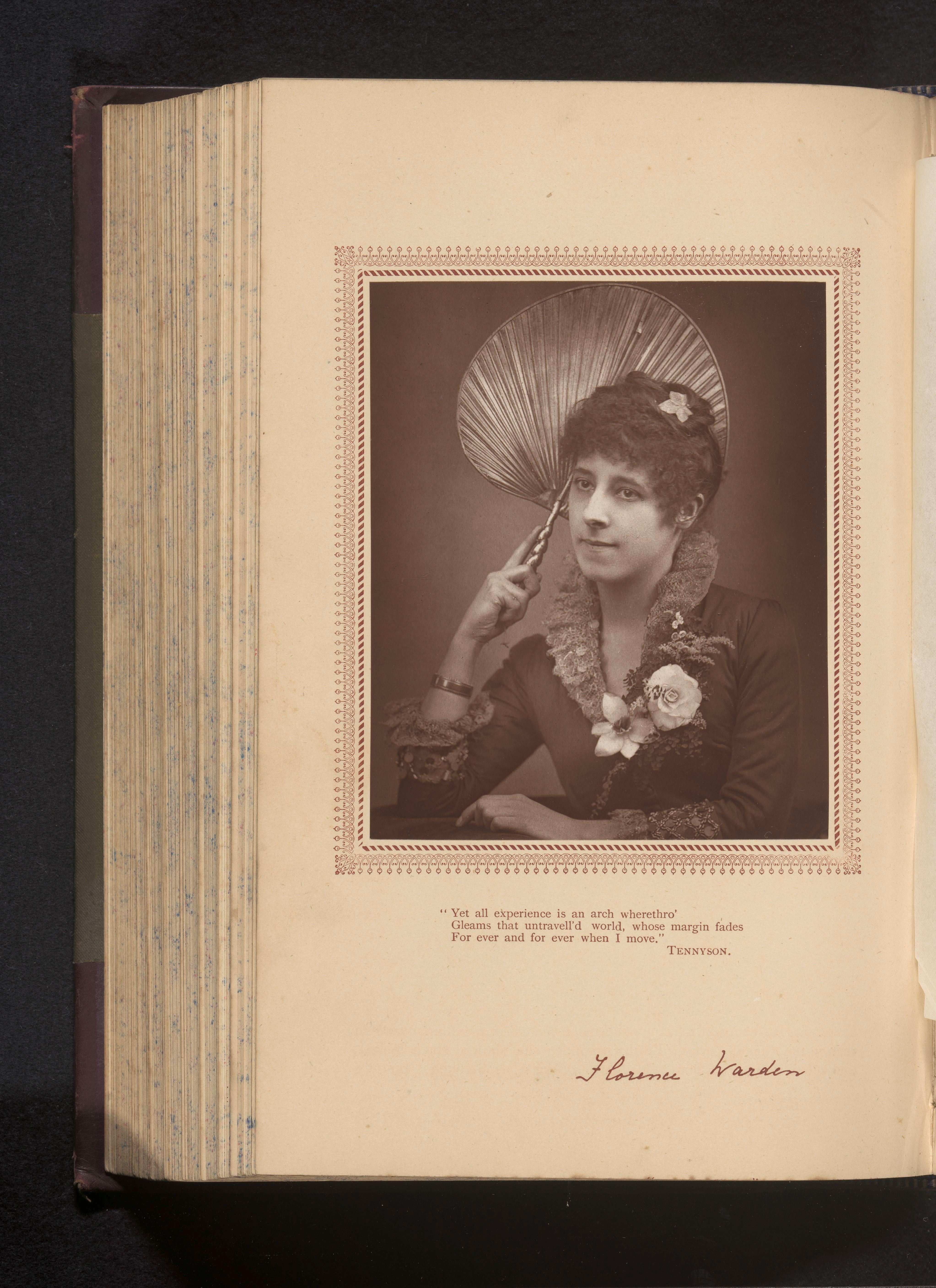 IdentificatieTitel(s): Portret van Florence WardenObjecttype: fotomechanische afdruk bladzijde Objectnummer: RP-F-2001-7-1358E-15Opschriften / Merken: opschrift, recto, gedrukt: ‘'Yet all experience is an arch wherethro'/ Gleans that untravell'd world, whose margin fades/ For ever and for ever when I move.'/ Tennyson’signatuur, recto, gedrukt: ‘Florence Warden’VervaardigingVervaardiger: vervaardiger: anoniemDatering: ca. 1880 - in of voor 1885Materiaal: papier Techniek: WoodburytypieAfmetingen: prent: h 114 mm × b 92 mmToelichtingPrent tegenover pagina 53.OnderwerpWat: historical personsadult womanWie: Florence WardenVerwerving en rechtenCredit line: Aankoop met steun van de Mondriaan Stichting, het Prins Bernhard Cultuurfonds, het VSBfonds, het Paul Huf Fonds/Rijksmuseum Fonds en het Egbert KunstfondsVerwerving: aankoop 2001Copyright: Publiek domein